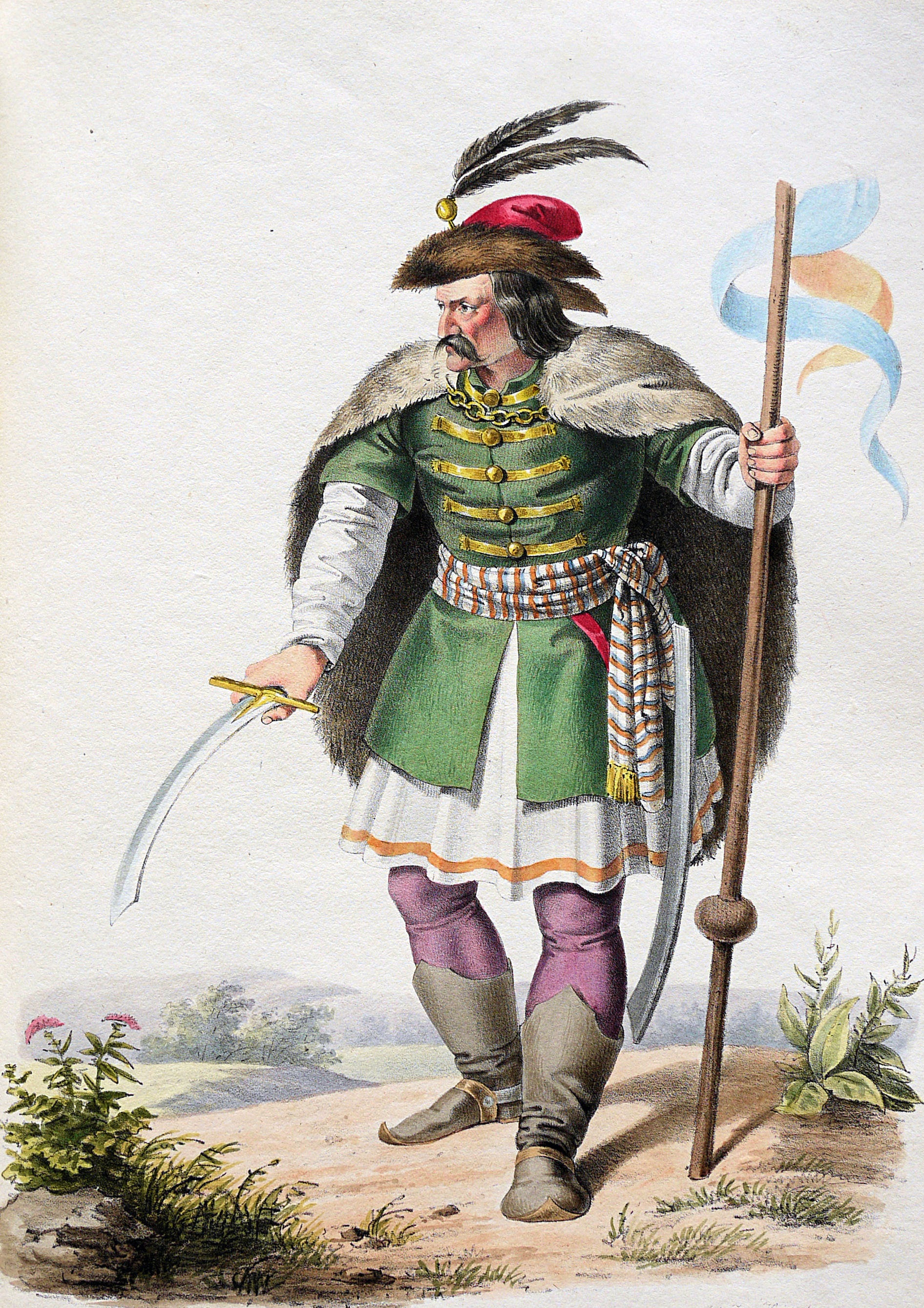 Zoltán (ca. 896-850), Großfürst von Ungarn. Lithographie von Josef Kriehuber nach einer Zeichnung von Moritz von Schwind aus Ungerns Erste Heerführer Herzoge und Koenige In einer Reihe von Bildnissen von Bela bis auf Seine Majestät Franz I. Kaiser Von Österreich König Von Ungern &c., &c. Wien : Lithographisches Institut ;ca. 1828